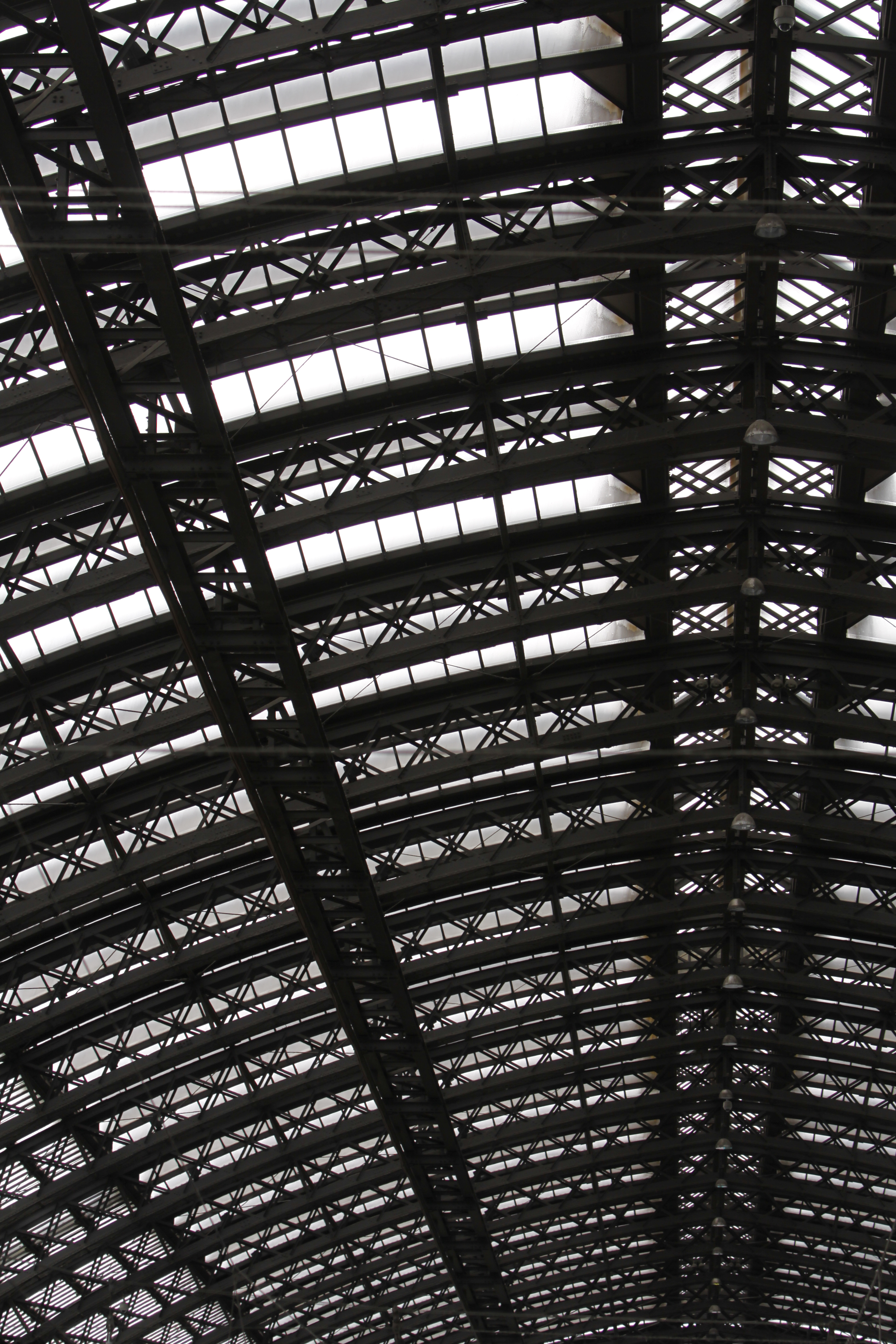 Durch das gleichmäßige Licht eines bedeckten Himmels wirkt die Stahlkonstruktion des Daches des Kölner Hauptbahnhofes wie eine graphische Komposition This is a photograph of an architectural monument., no. 0